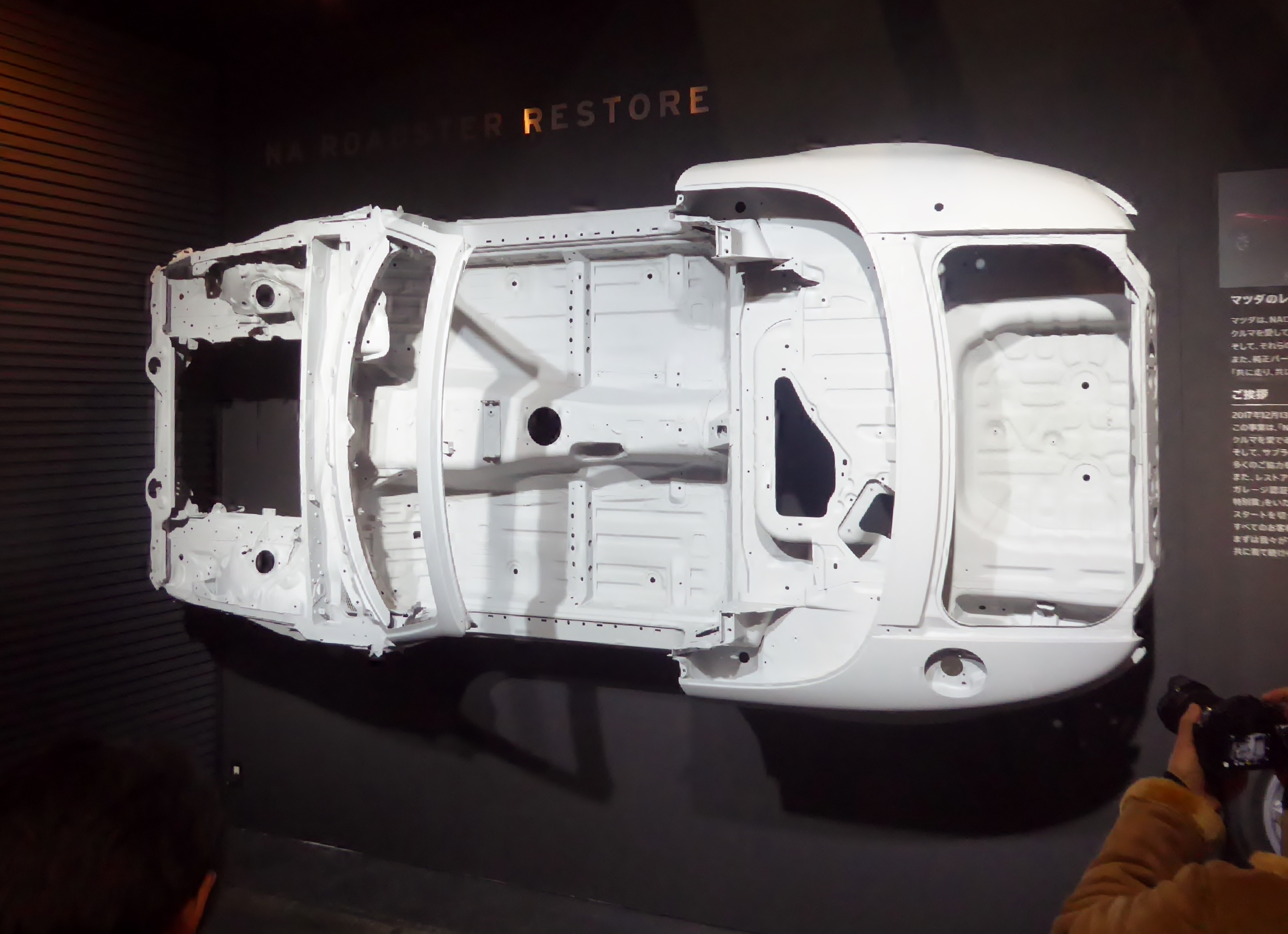 大阪オートメッセ2018に於いてE-NA6CE型ユーノス・ロードスターのホワイトボディを撮影。